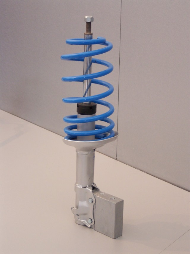 McPherson-Federbein